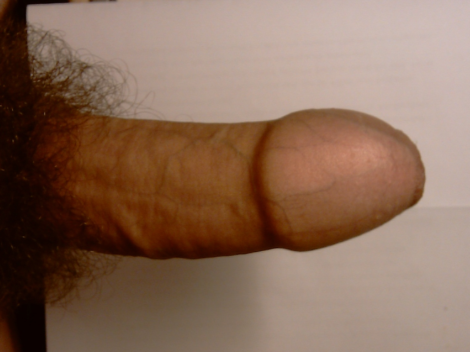 Penis steif mit Vorhaut über der Eichel